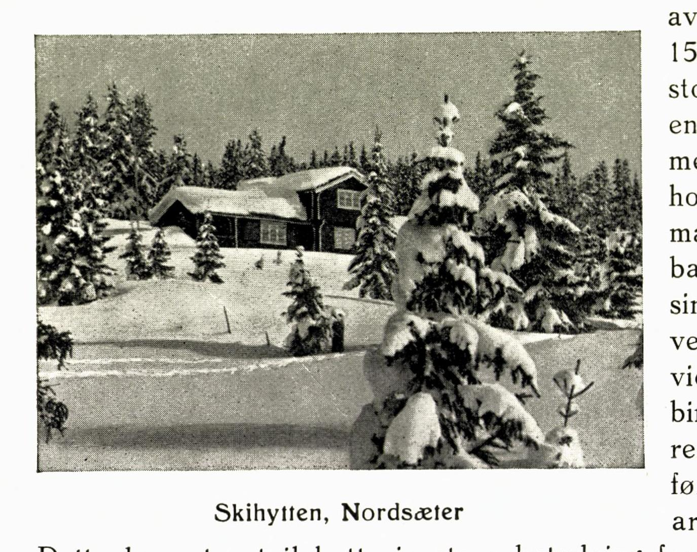 Illustrasjon hentet fra boken "Lillehammer 1827-1927" av og utgitt av (Lillehammer, 1927)